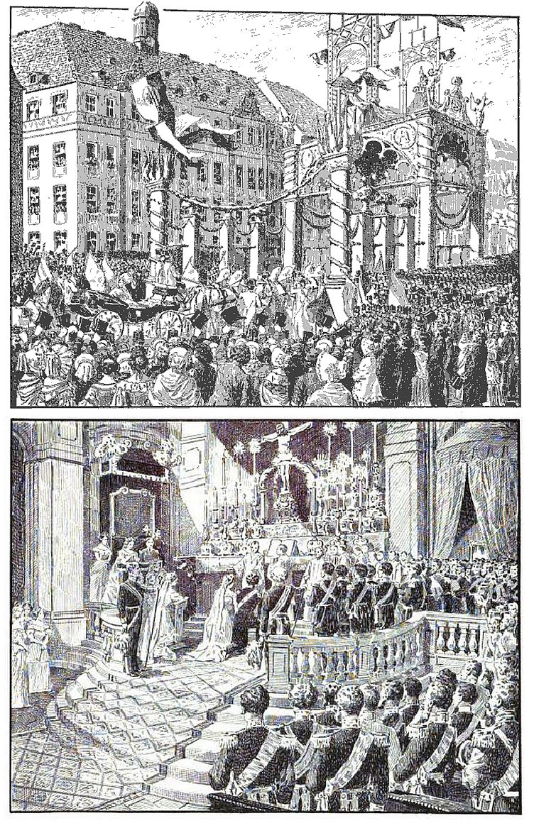 Empfang und Vermählung von Prinz Albert und Prinzessin Carola am 18. Juni 1853 zu Dresden